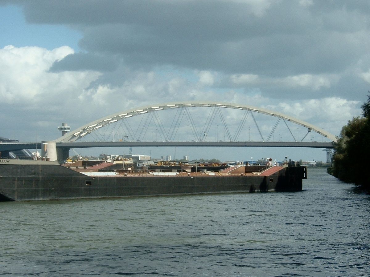 van Brienenoordbrug, vanaf het eiland van Brienenoord.